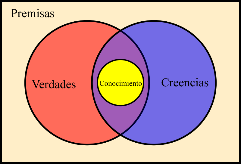 El conocimiento como intersección de creencias y verdades